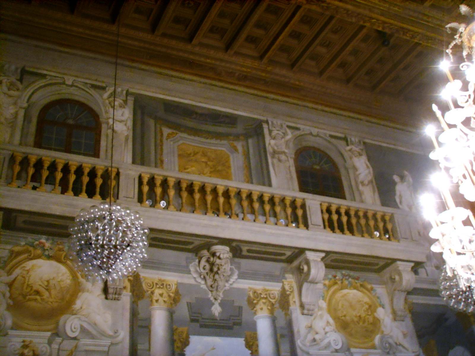 Palazzo incontri, salone affrescato, lato o